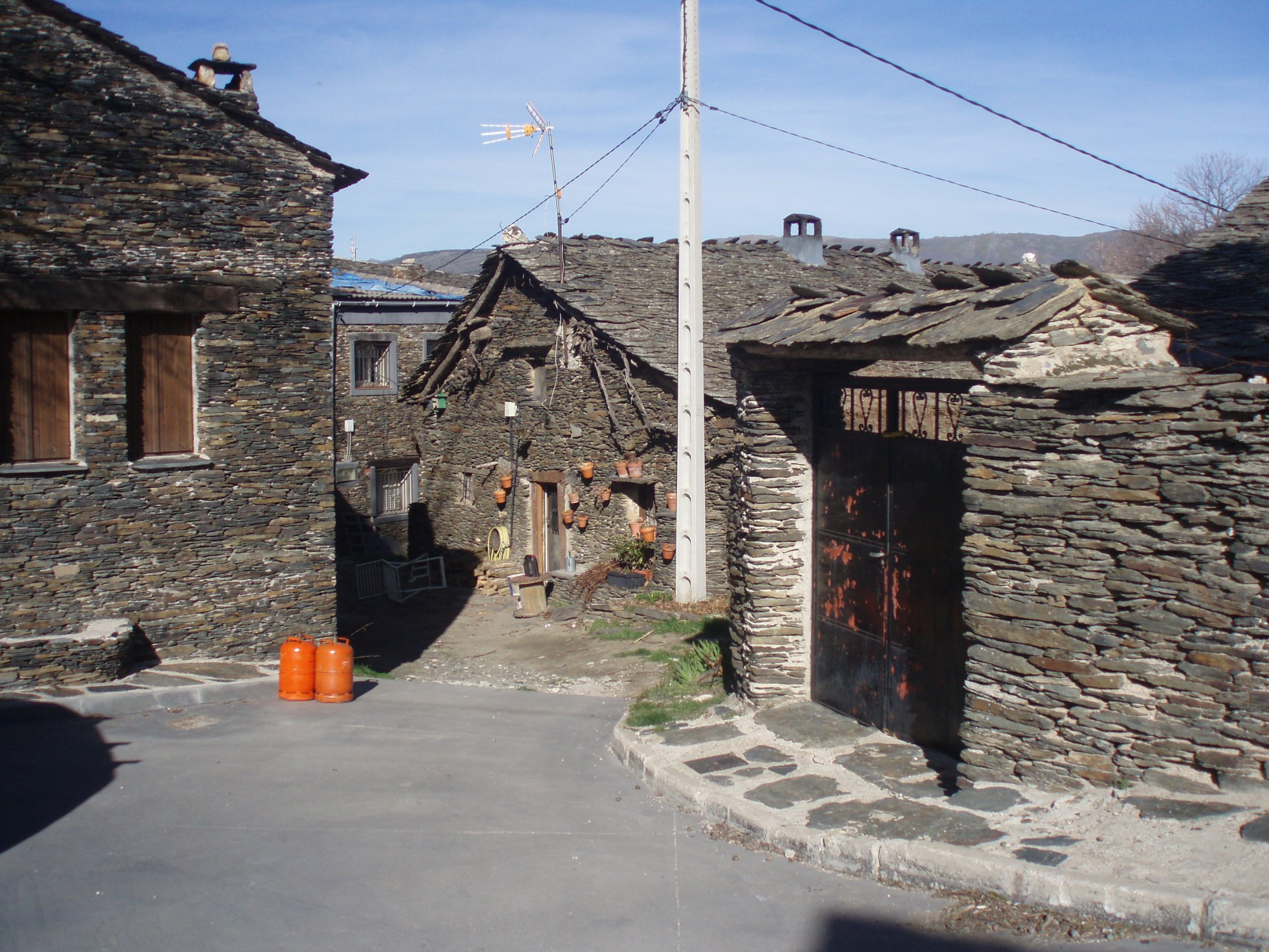 Edificios representativos de la arquitectura negra en Majaelrayo (Segovia), España.